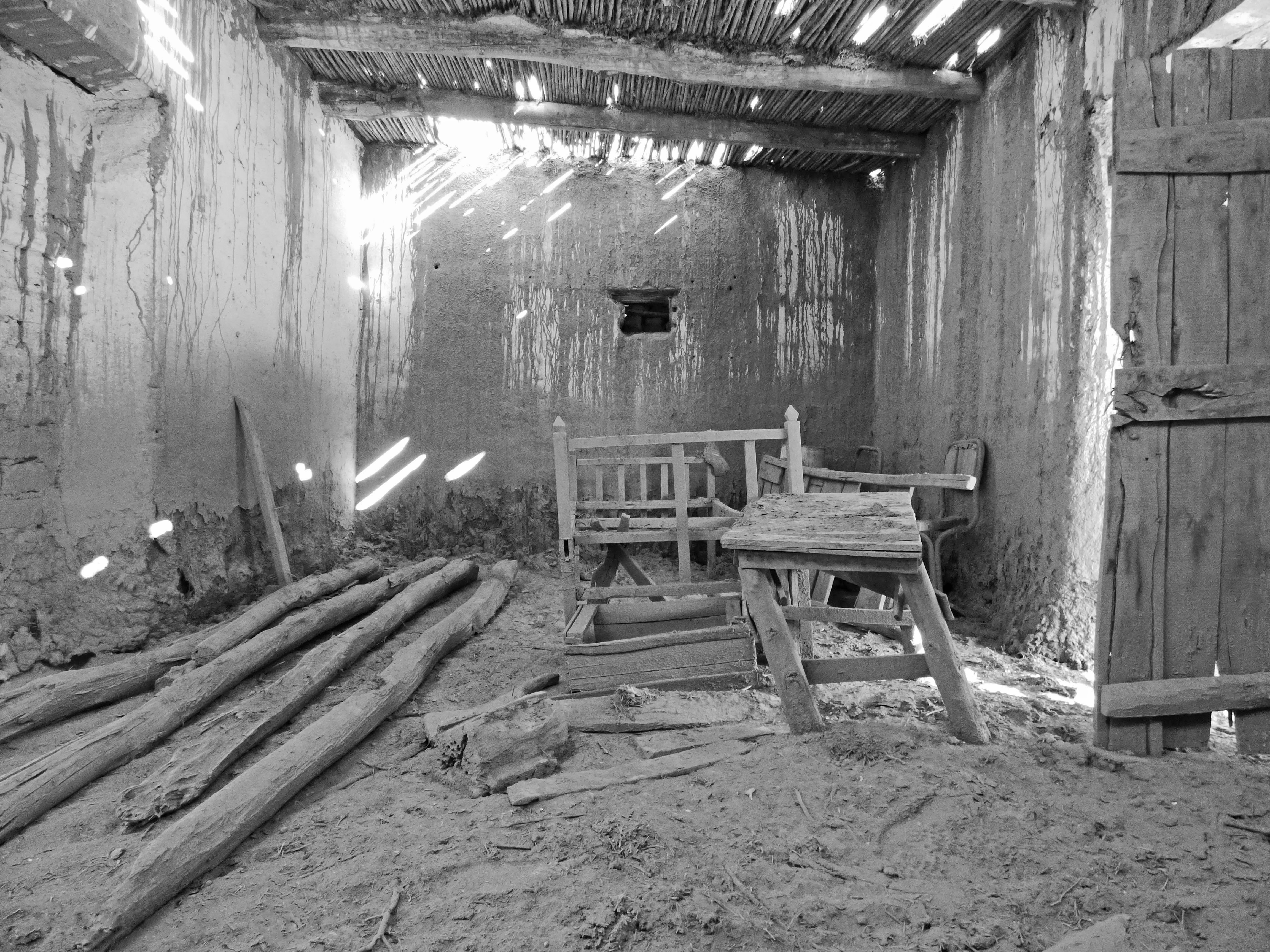 En la imagen observamos el interior una casa deshabitada que contiene una cama, una mesa, y sillas. Esta casa es de un pueblo abandonado llamado “Aguaditas” ubicado a 3km de la localidad de Villa Castelli. Aguaditas: lugar donde se situaban los primeros habitantes del departamento, luego al concurrir por razones de comodidad hacia más al centro del mismo, se deja este sitio abandonado con todas sus pertenencias, allí aún se puede observar tal cual quedaron las cosas como la gente dejo.